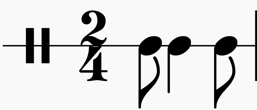 Пример базовой синкопы